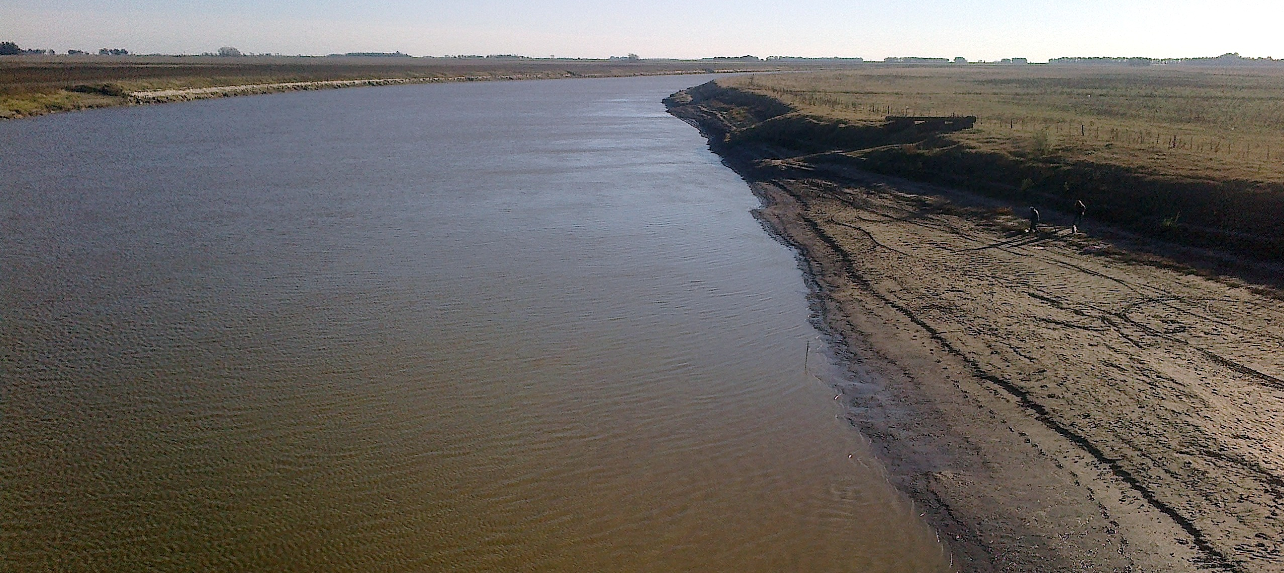 Vista desde el puente sobre Río Salado, en el camino de tierra de Chascomús a Pila, Provincia de Buenos Aires.